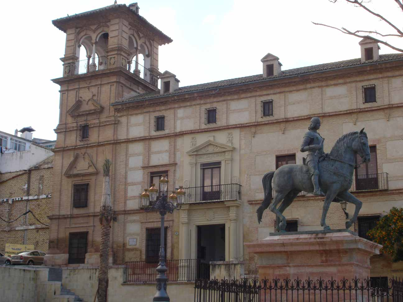 Puerta principal del Museo de Antequera y estatua ecuestre de Fernando el de Antequera, conquistador de la ciudad en 1410.